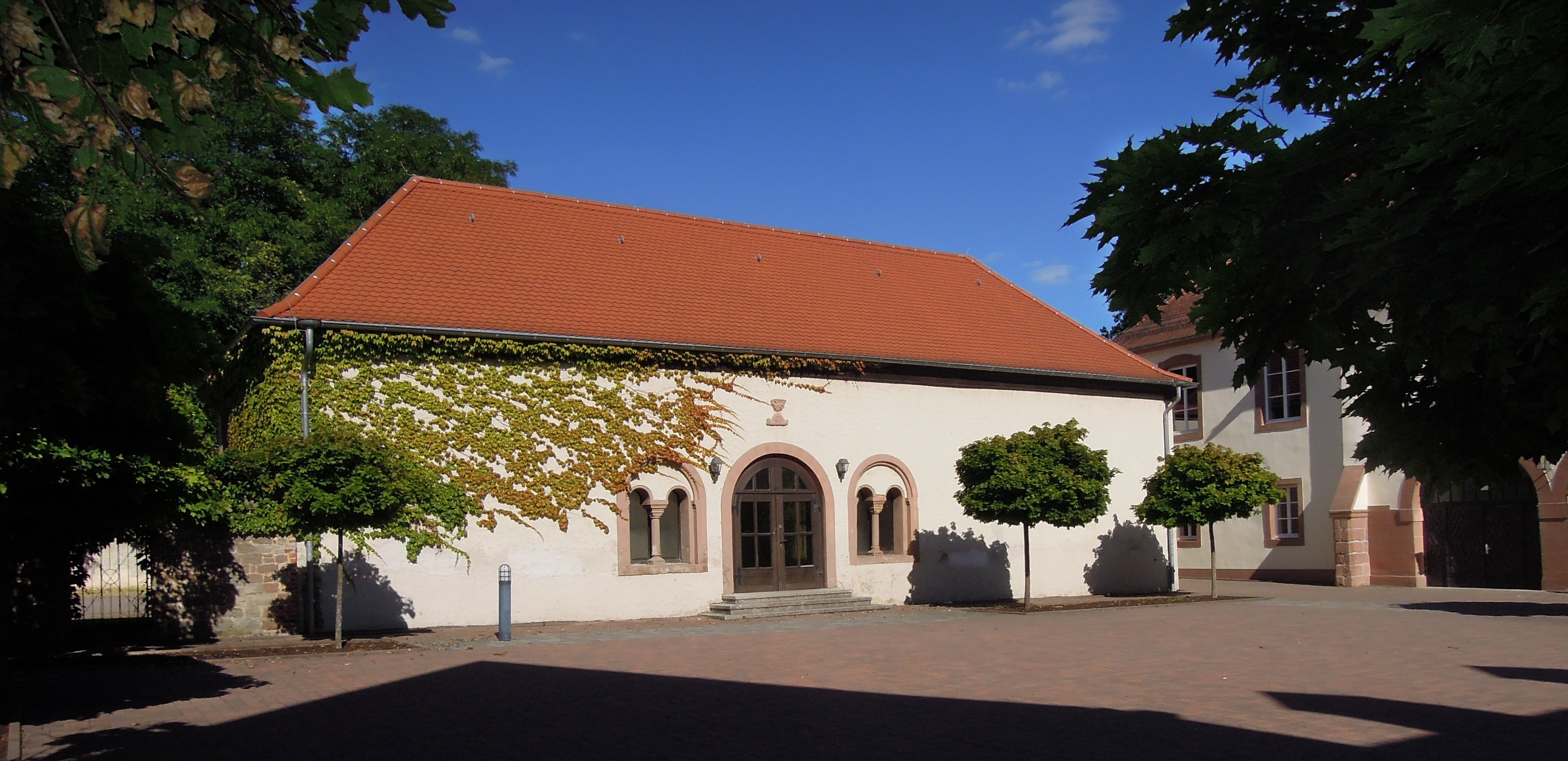 Augustinerinnen-Kloster, Kirche, Kreuzgangmauern 1906 (Einzeldenkmal)